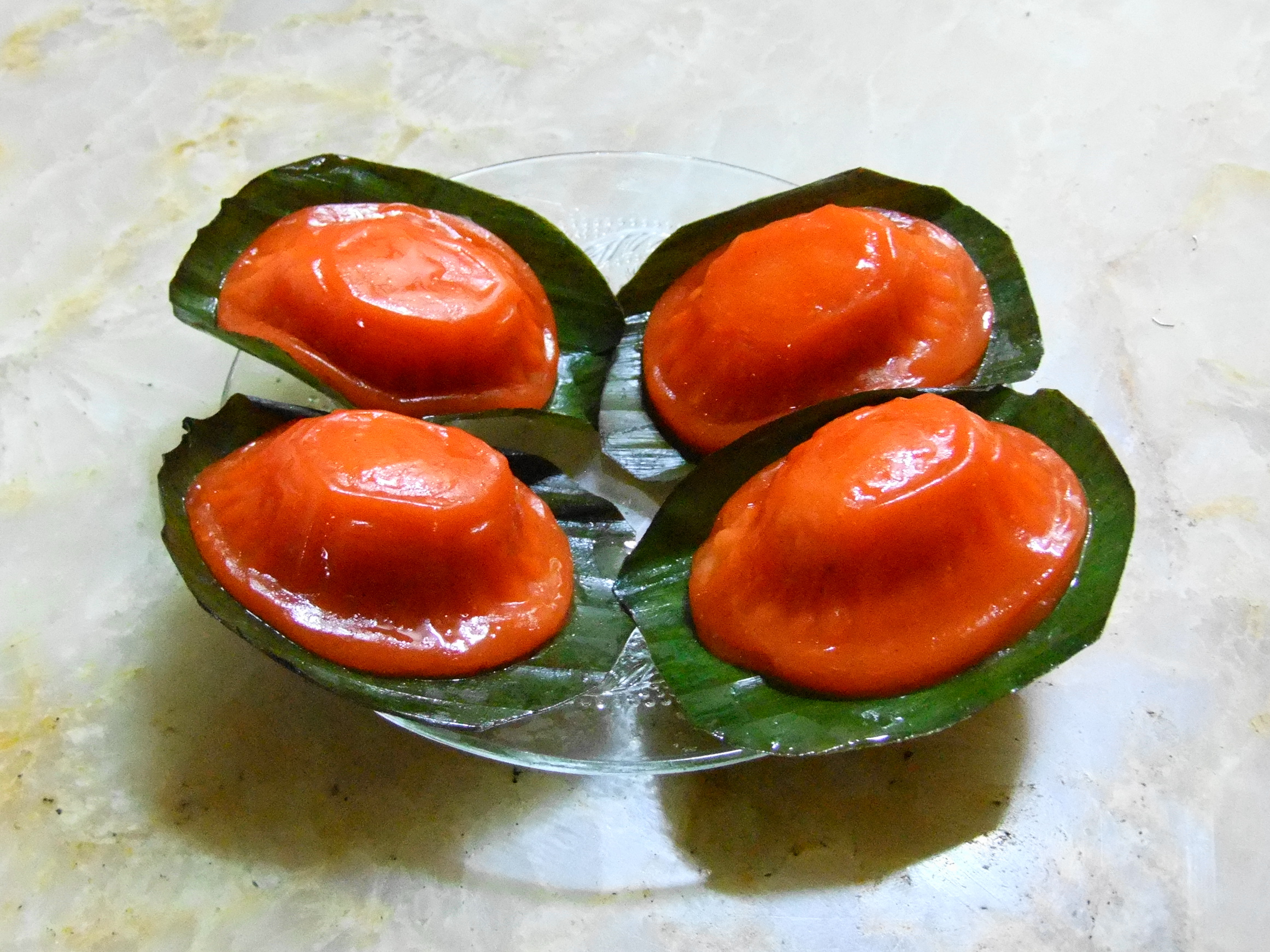 Kue ku dibeli di Jakarta